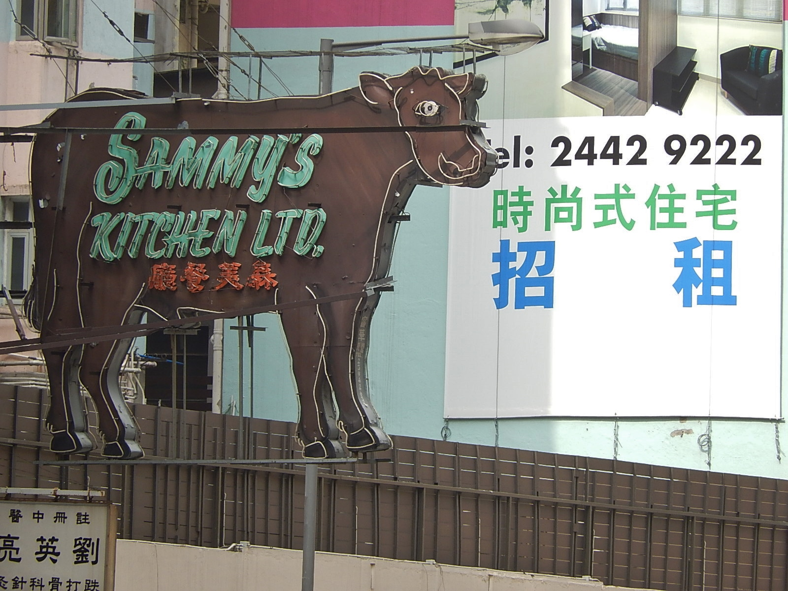 Sammy's Kitsch Kitchen